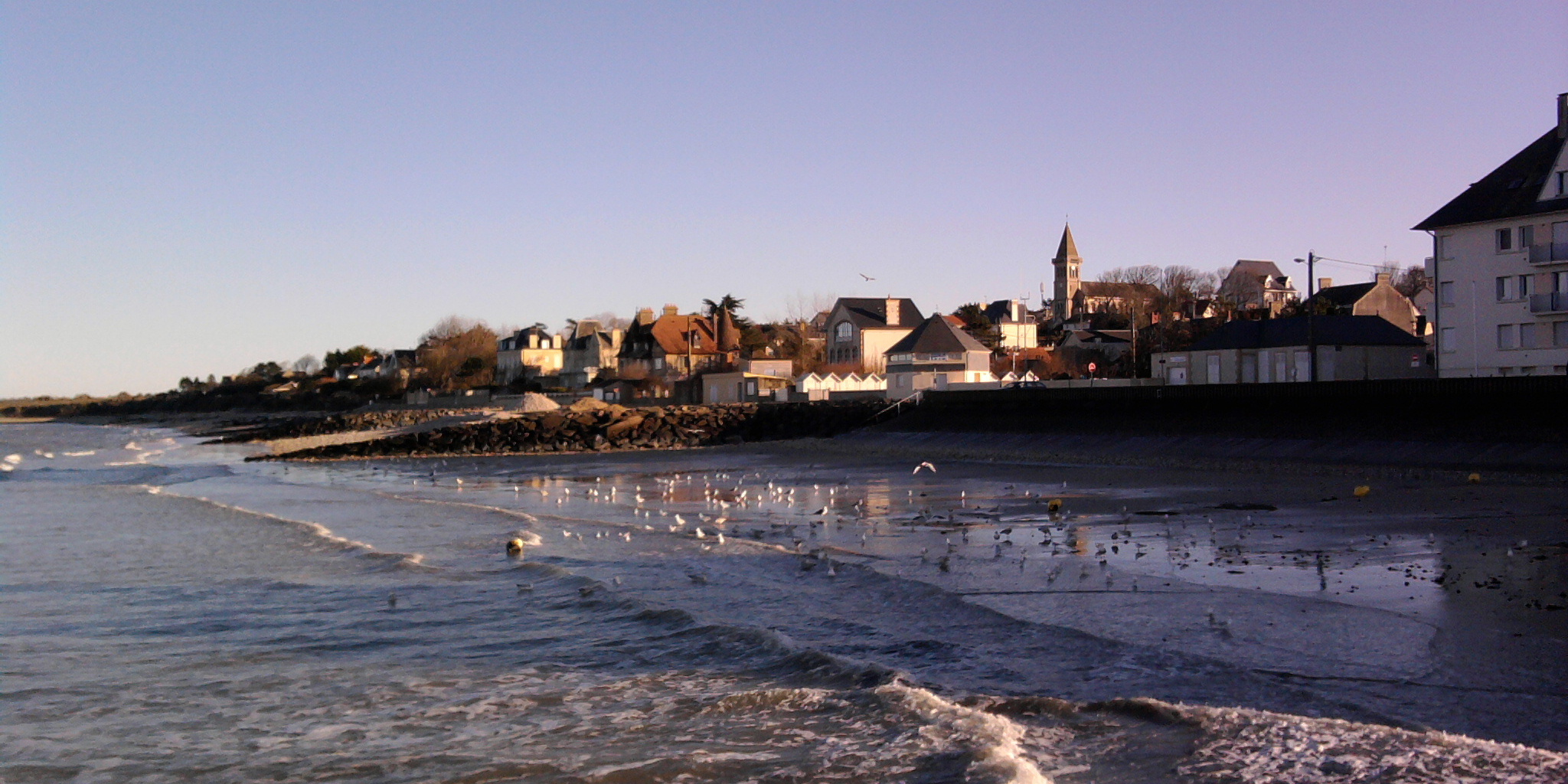 QUARTIER DES BELLES MAISONS ET VILLAS DE Grandcamp-Maisy